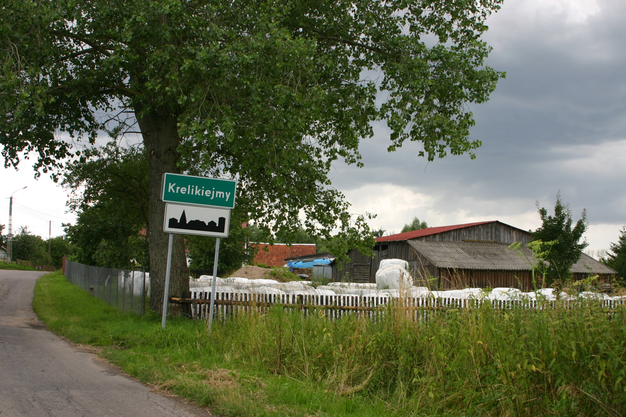 Krelikiejmy - OpenStreetMap(Info)